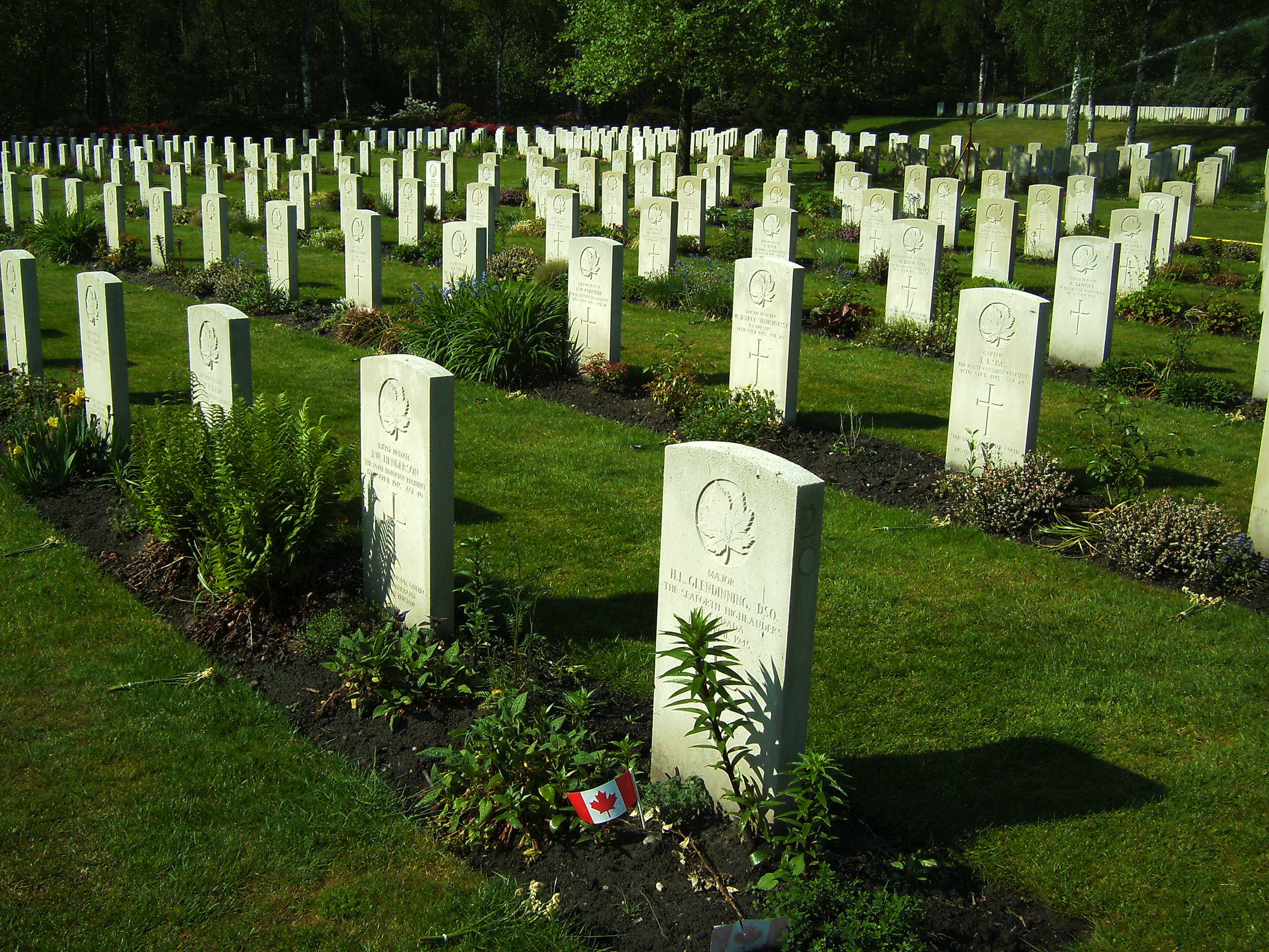 Canadian War Cemetery Holterberg, Holten, the Netherlands — Canadese oorlogsbegraafplaats Holterberg Holten